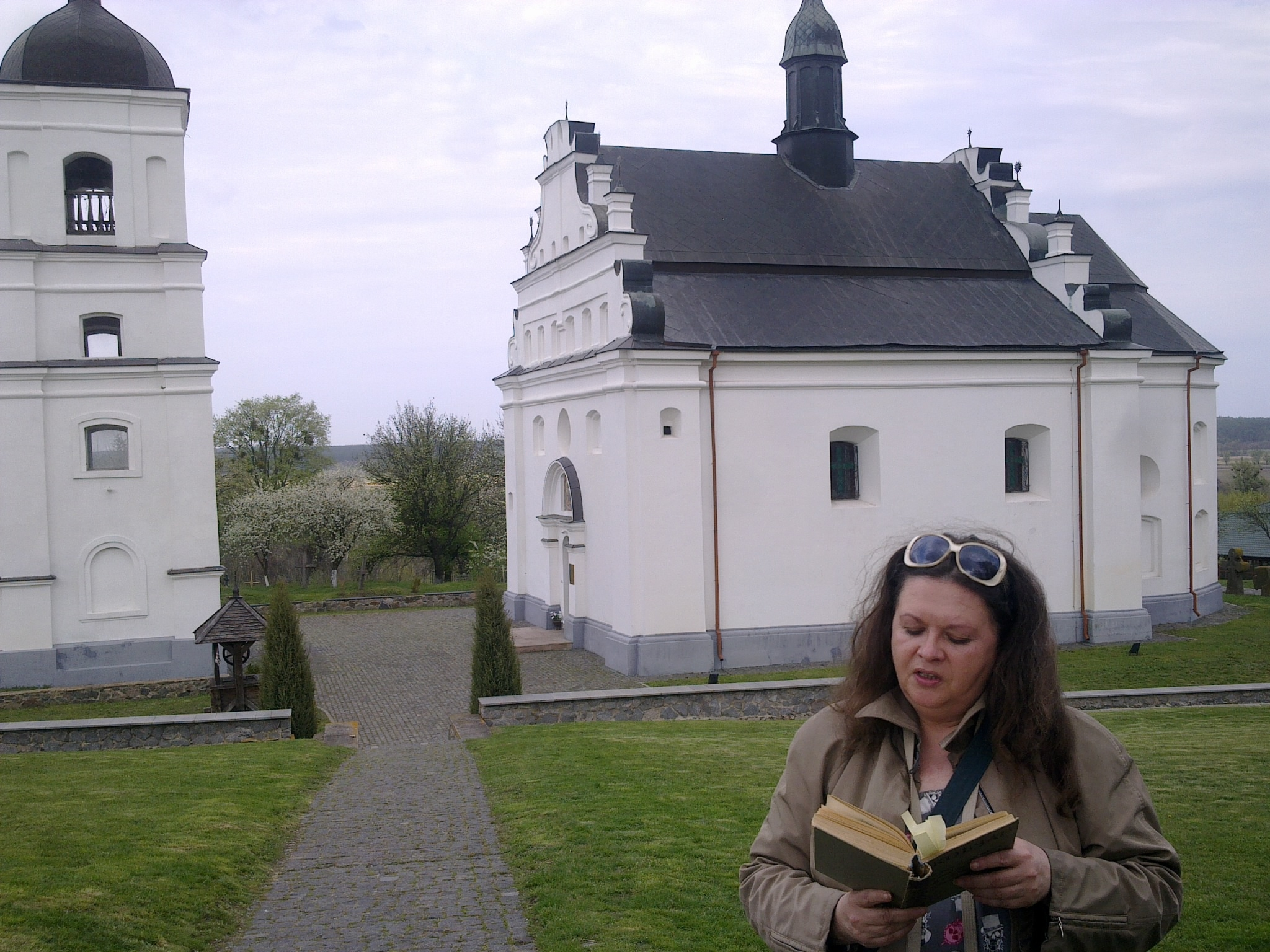 Липа Катерина Анатоліївна